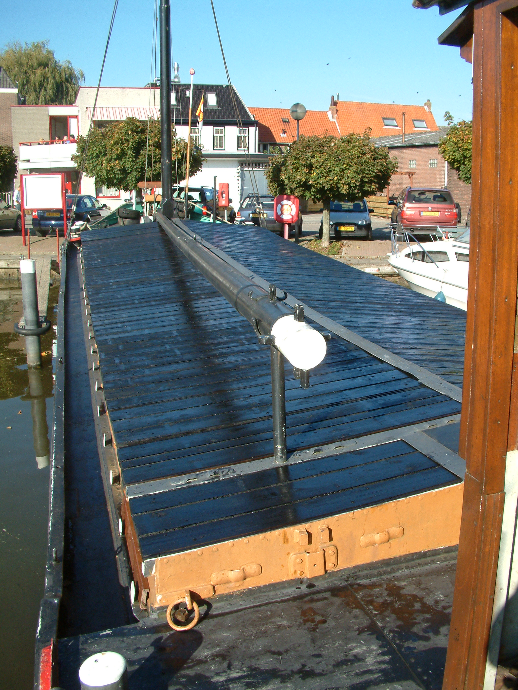 Het gangboord van varend monument Stella Maris Categorie:Binnenvaart